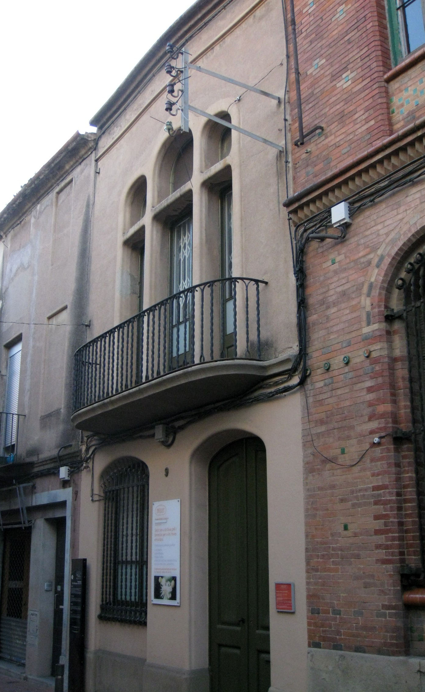 Magatzem Emili Matalonga, al carrer de Sant Pau núm. 9 (Terrassa). Edifici modernista de Lluís Muncunill, del 1911.